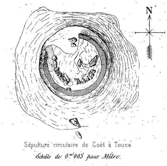 Dessin vue du haut, par James Miln, de la sépulture circulaire de Toul-Prieu, au lieu-dit Coëtatouz, à Carnac.